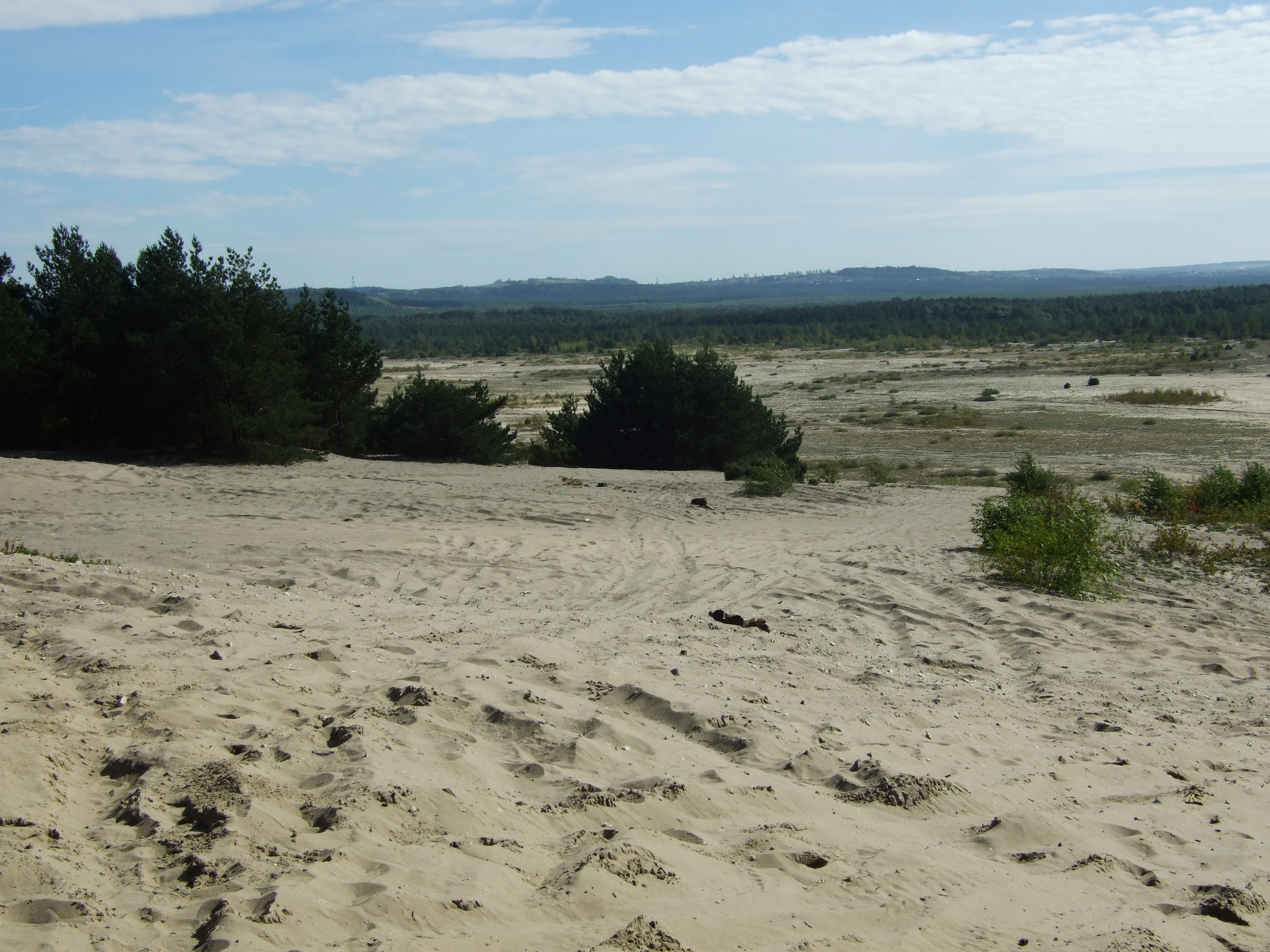 Pustynia Błędowska w okolicach Chechła